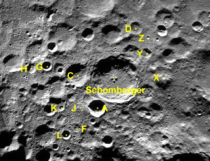 Cráter lunar Schomberger. Cráteres satélite. (Imagen LRO)